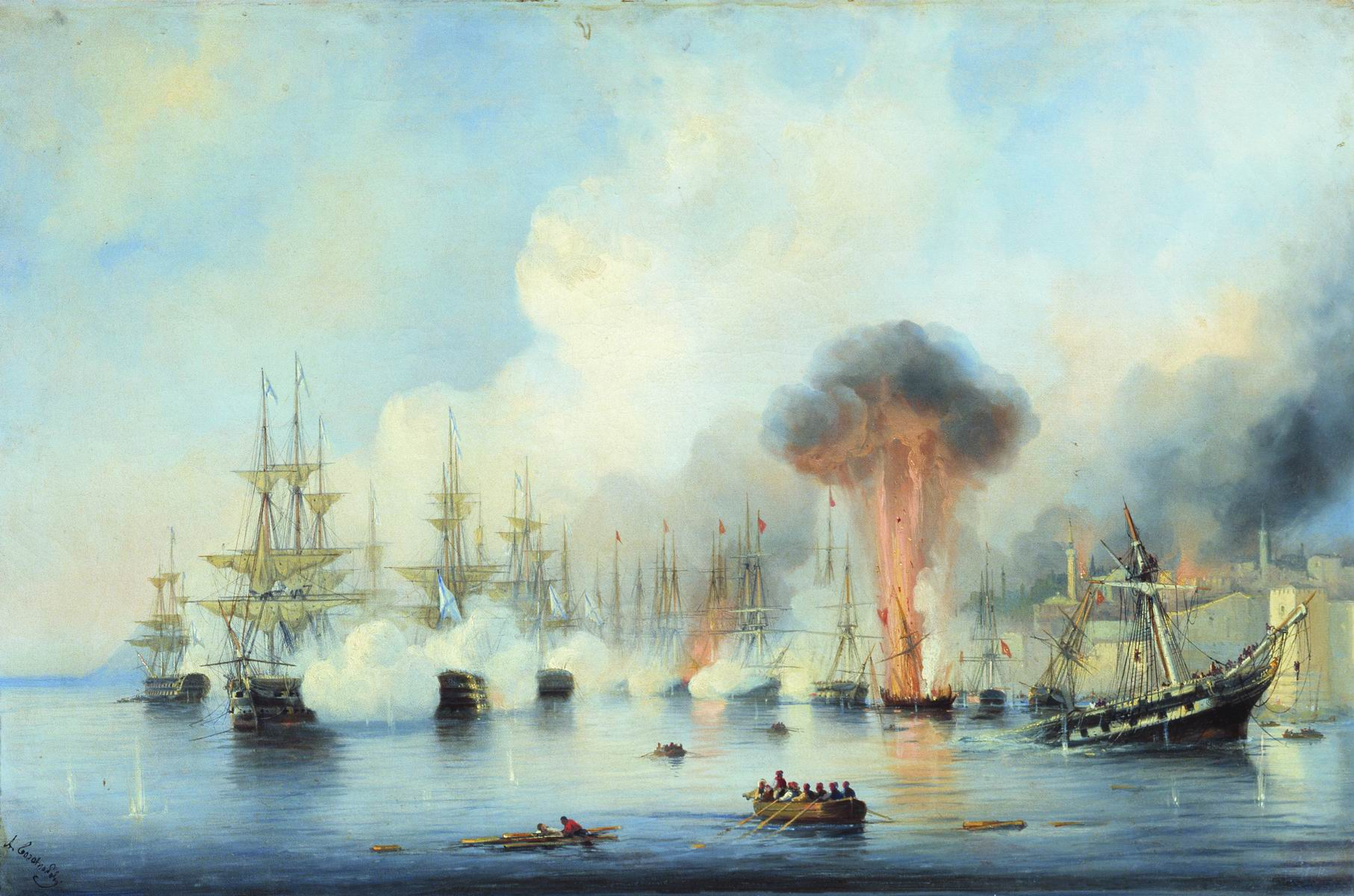 Battle of Sinoplabel QS:Len,"Battle of Sinop"label QS:Lru,"Синопский бой 18 ноября 1853 года."